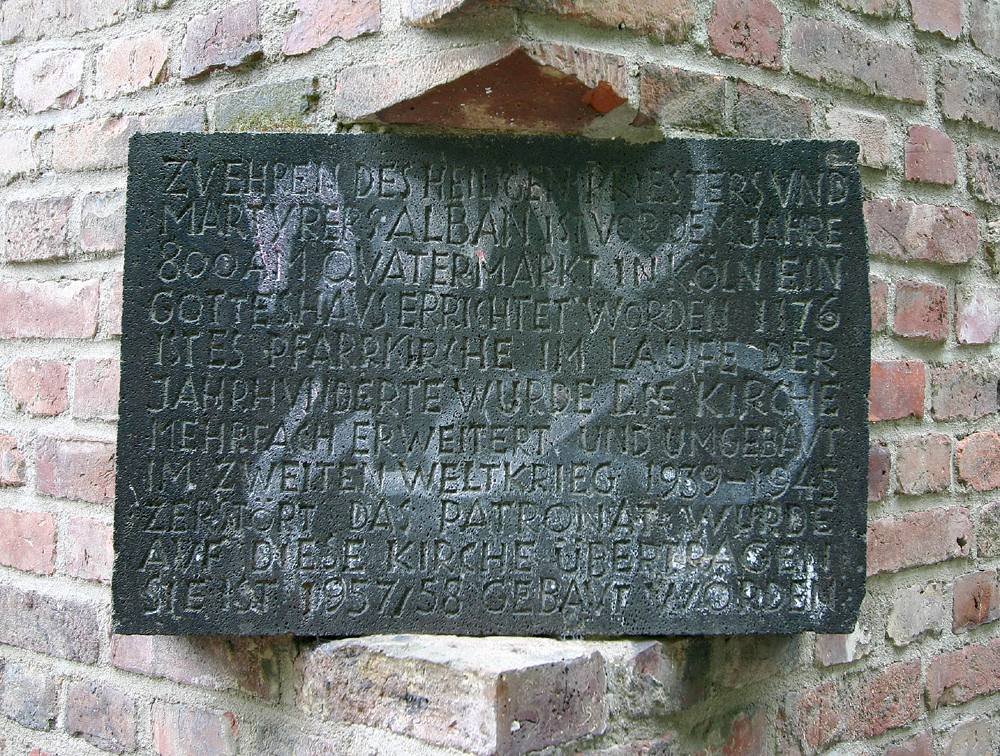 Neu St. Alban in Köln, Gedenktafel